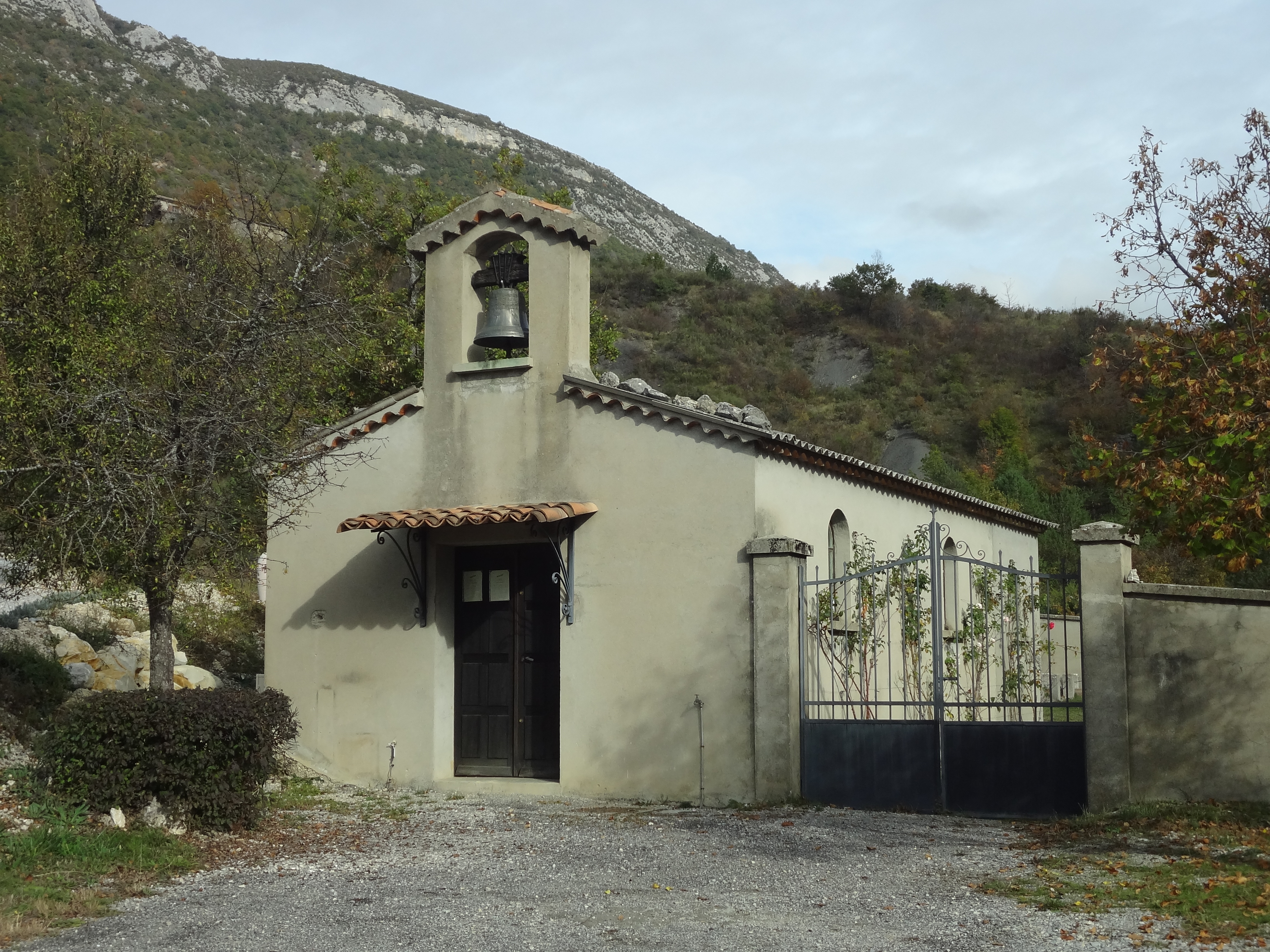 église neuve Saint-Martin de Curel (bas de la montagne)